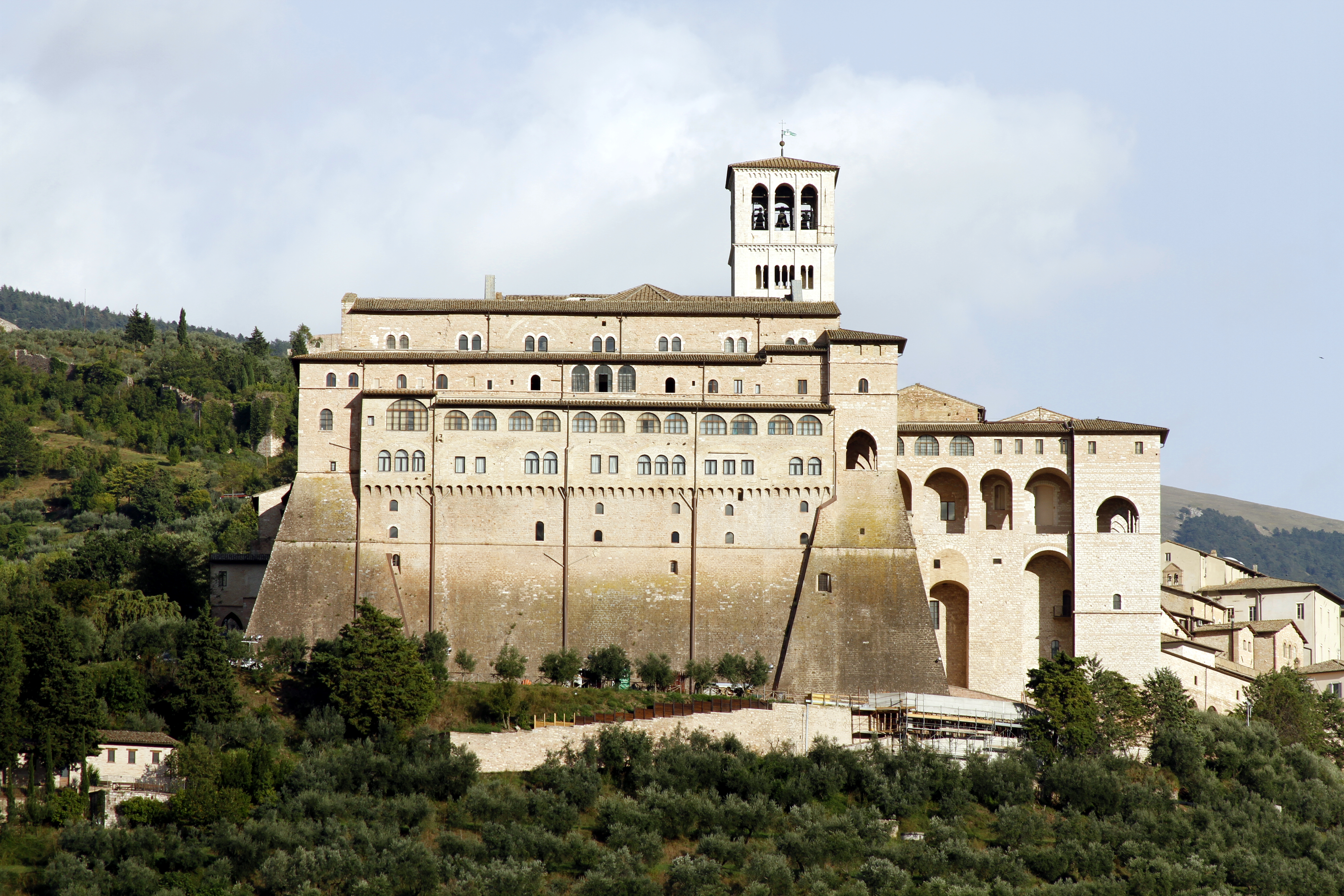 Basilica di San Francesco - Assisi